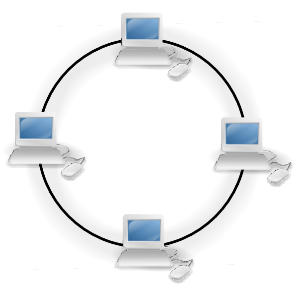 Debuxo realizado a partir de e